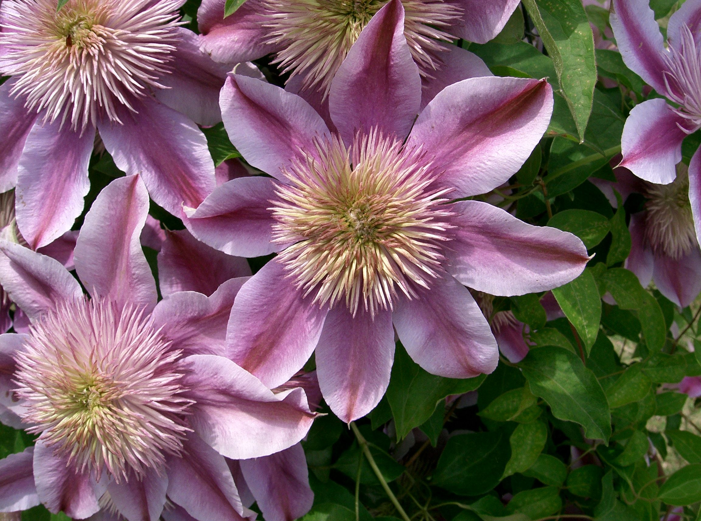 Clematis 'Evijohill' (JOSEPHINE™)